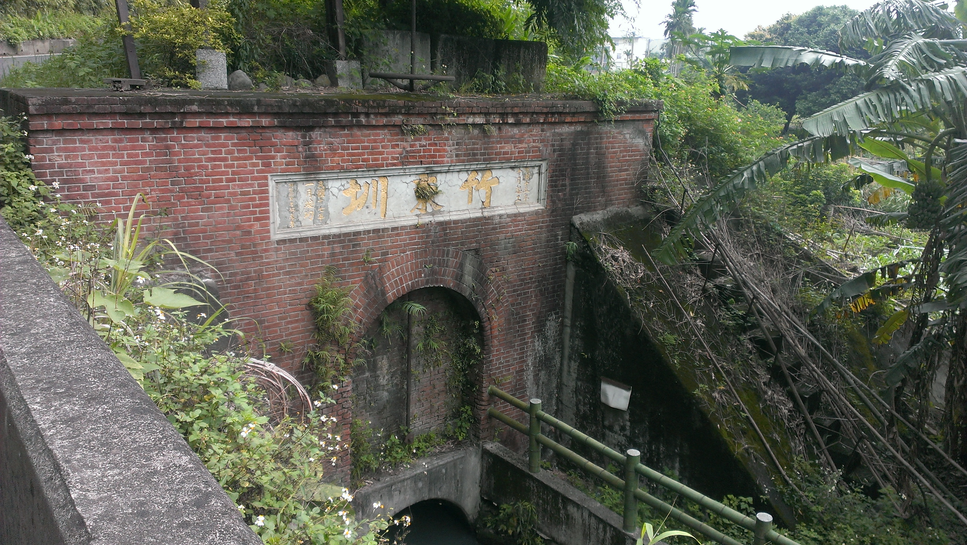 竹東圳一號隧道二